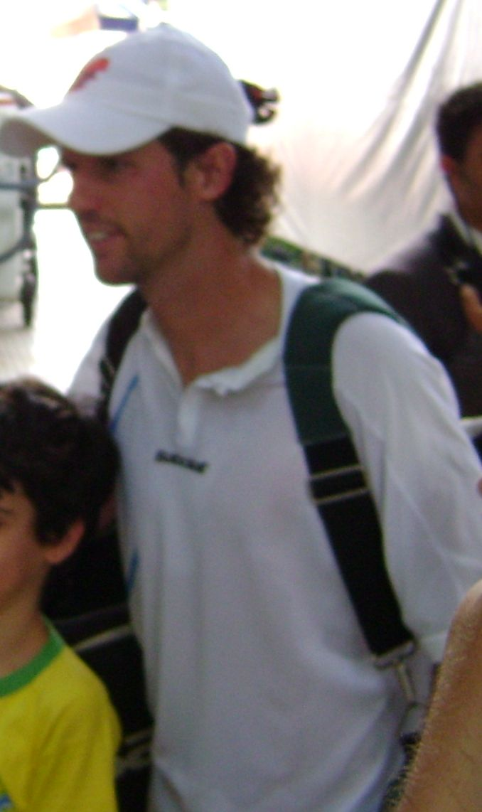 Tenista brasileiro Ricardo Mello, no Aberto de São Paulo de Tênis.